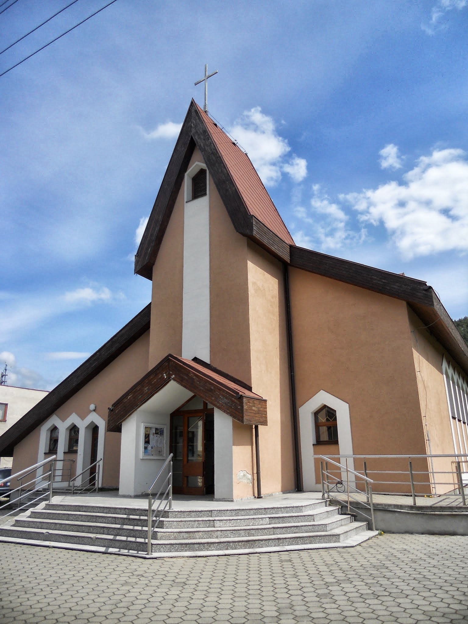 Kostolík Štiavnička